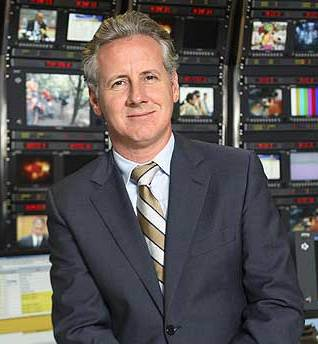 El periodista español Lorenzó Milá, en la mesa de control de informativos de TVE.